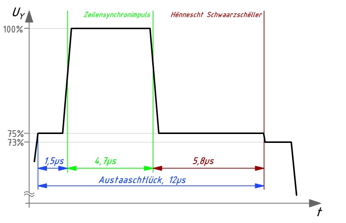 Dëst Bild weist Horizontalsynchronsignal am BAS-Signal